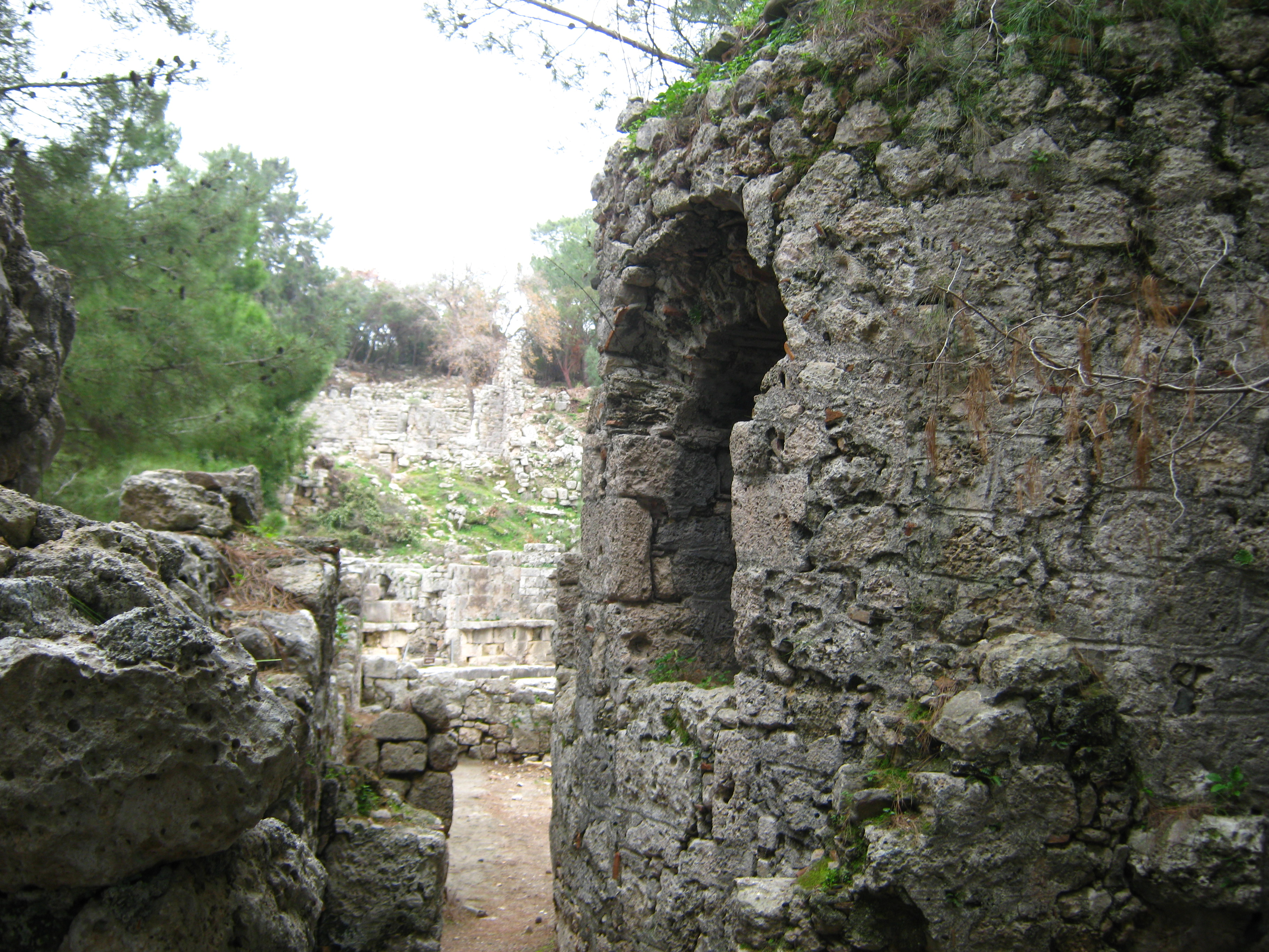 Фаселісю Абсида ранньохристиянської базиліки